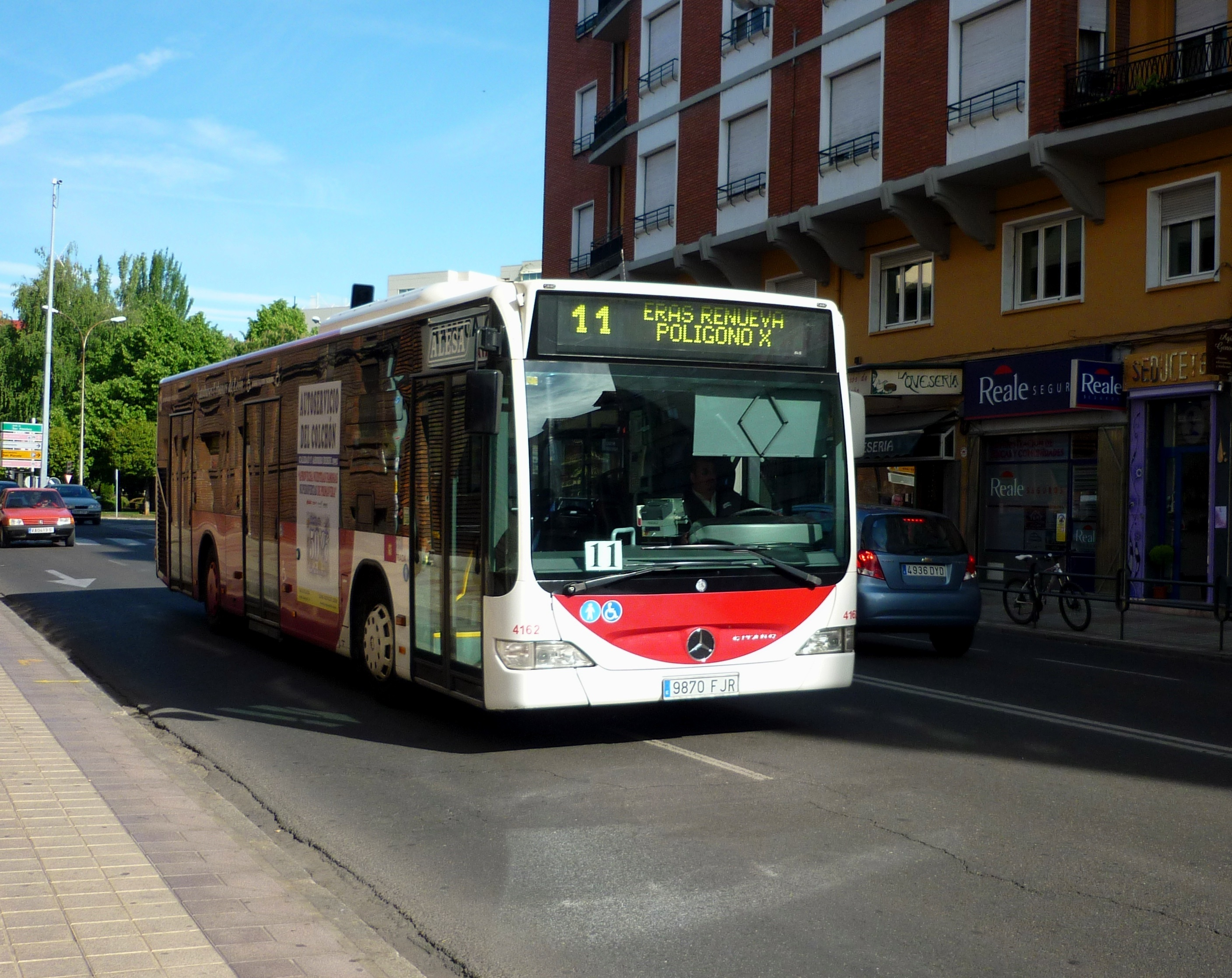 ALSA - 4162